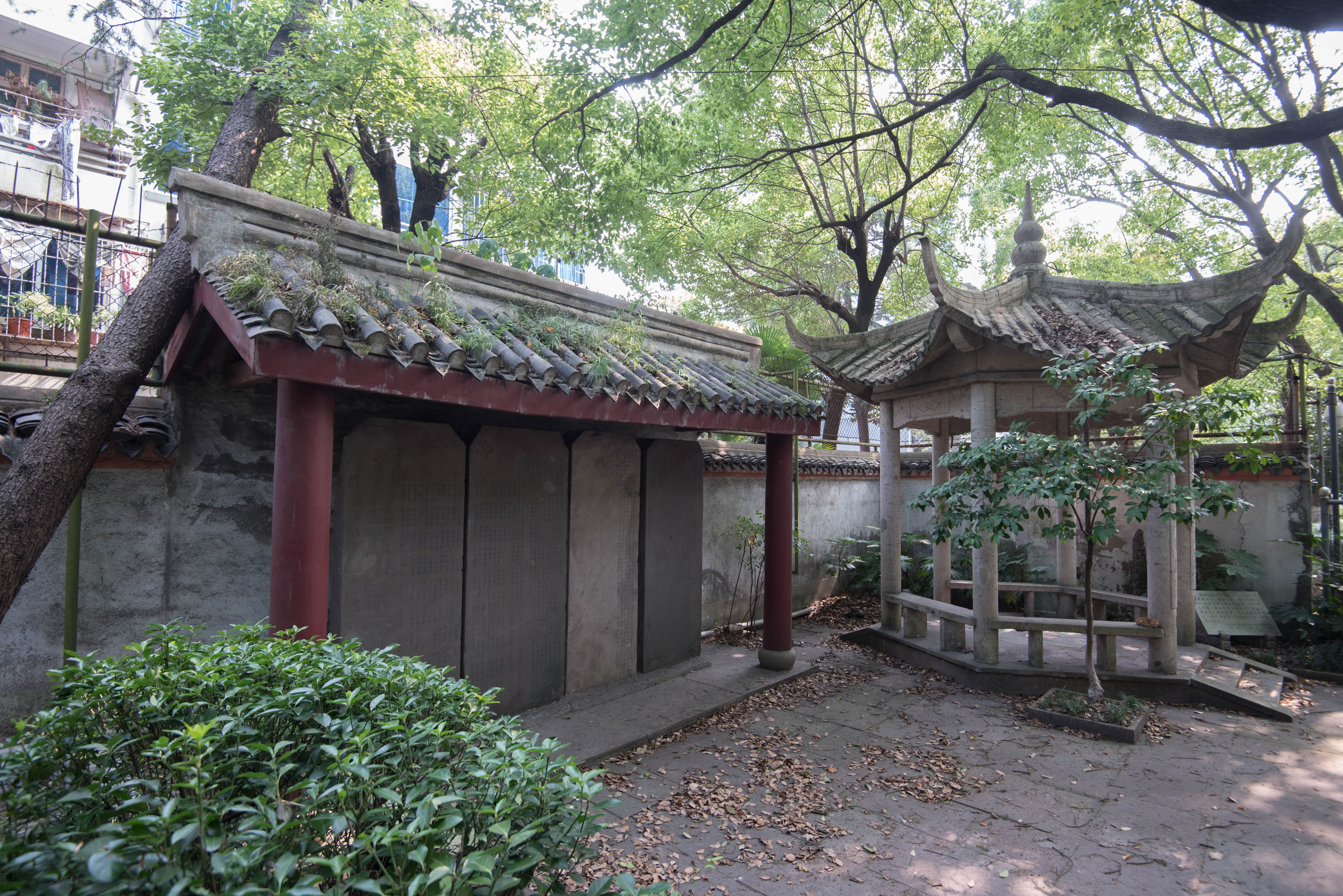 俞大猷生祠碑记